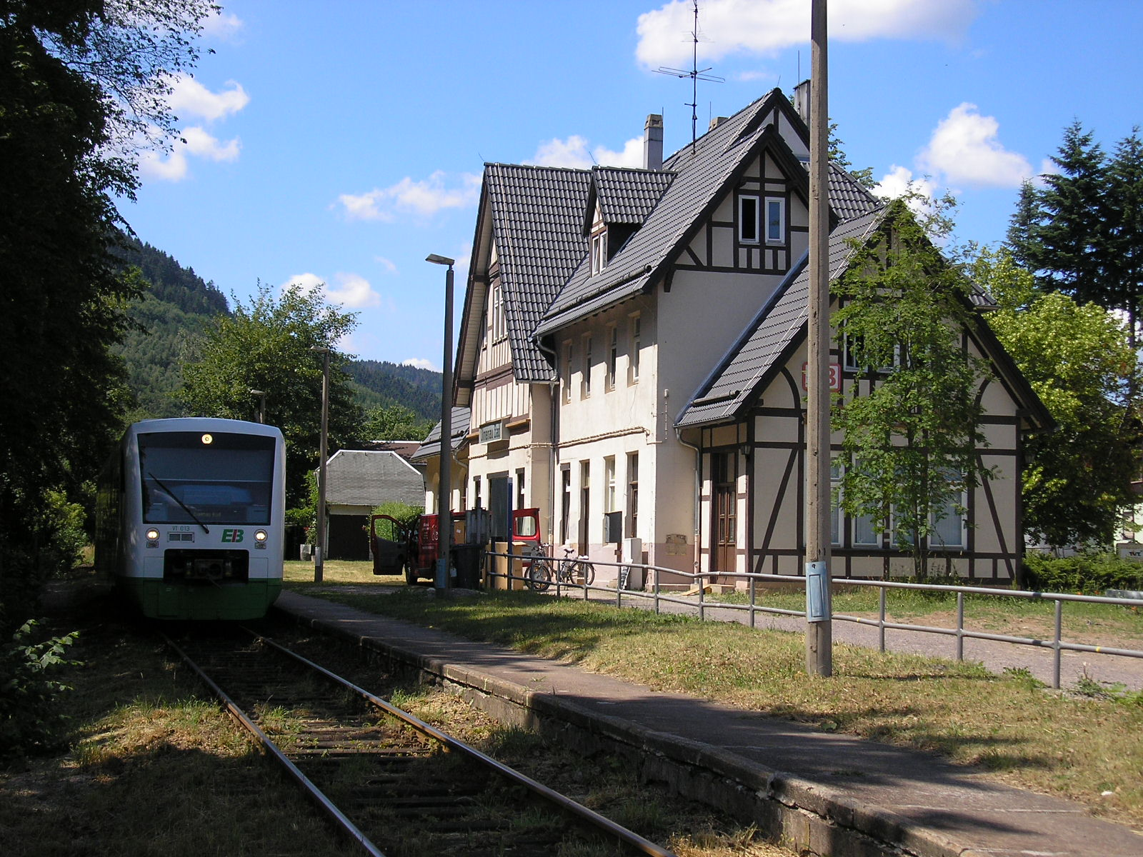 Der Bahnhof Ilmenau-Bad mit EIB von Ilmenau nach Erfurt.